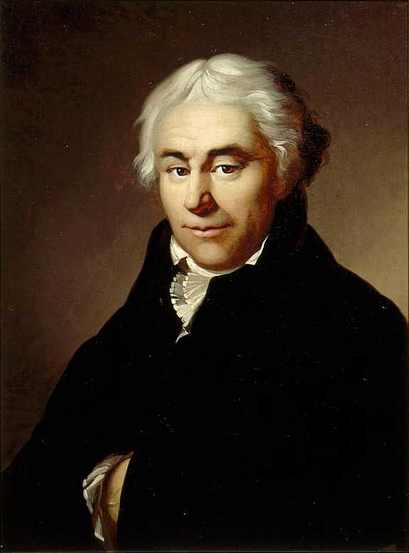 Charles Sulpice Flament (1758-1836), een Franse priester, van 1798 tot 1811 custos en van 1811 tot 1835 bibliothecaris van de Nationale Bibliotheek (nu: Koninklijke Bibliotheek)